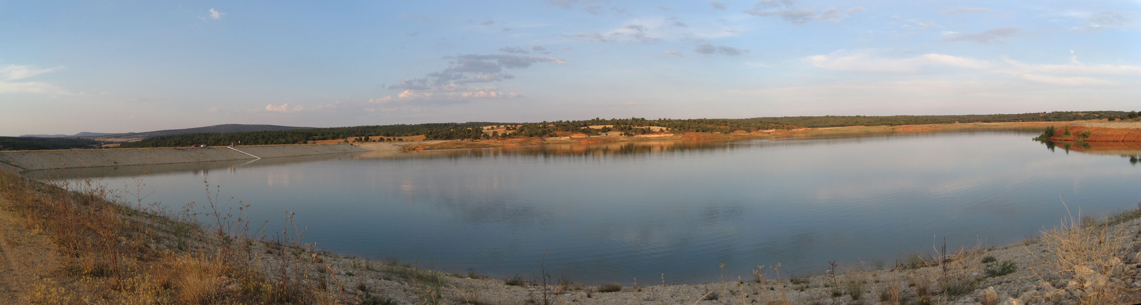 Vista panorámica del pantano de Arauzo de Salce (Burgos, España).